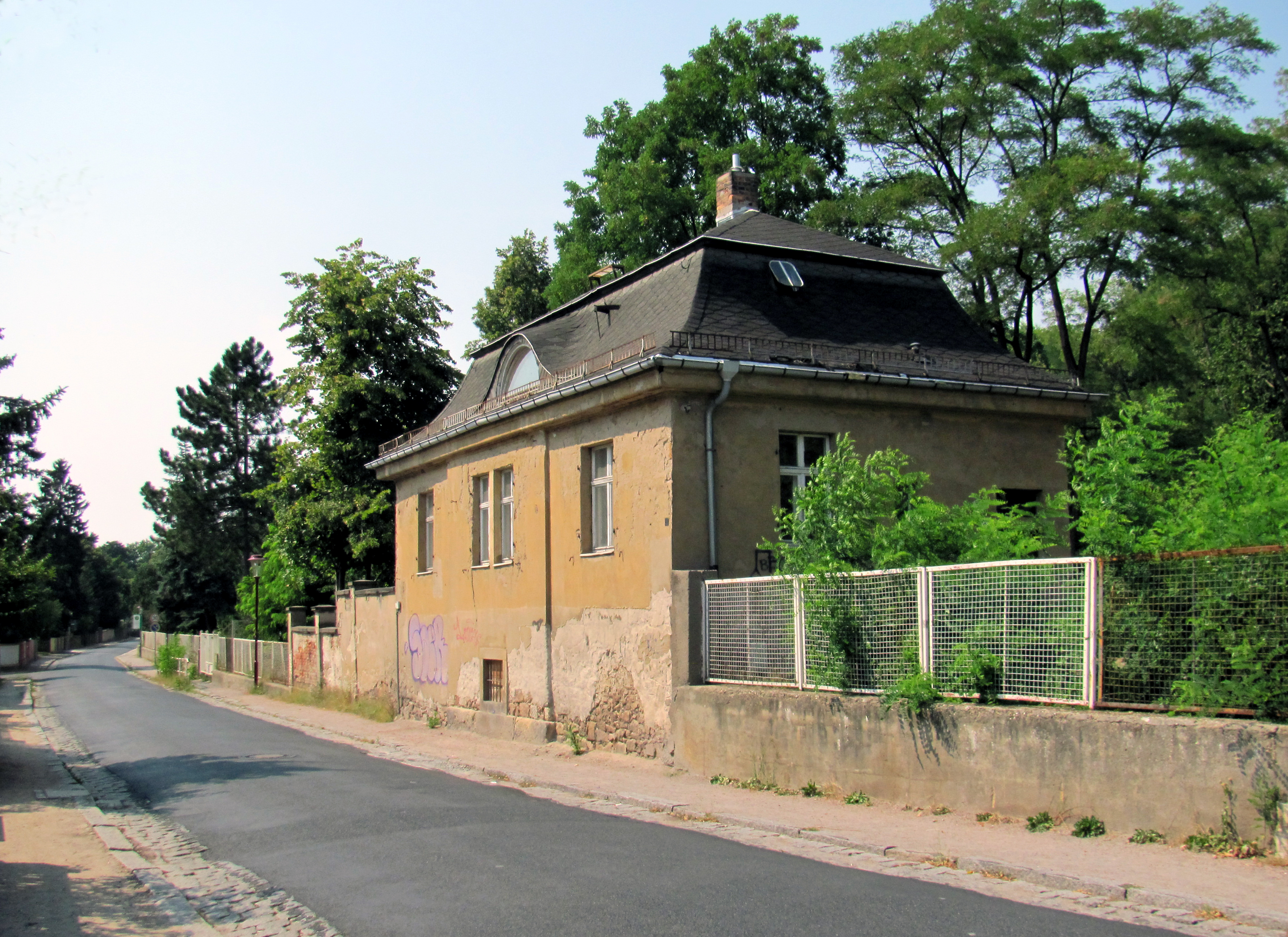 Radebeul-Oberlößnitz, Villa Wach, Torhaus an der Straße